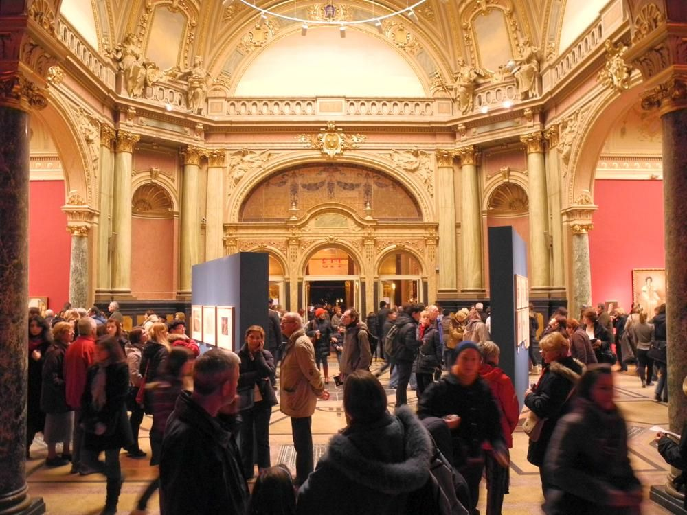 Unutrašnjost Umjetničkog paviljona u Zagrebu tijekom Noći muzeja 2012.